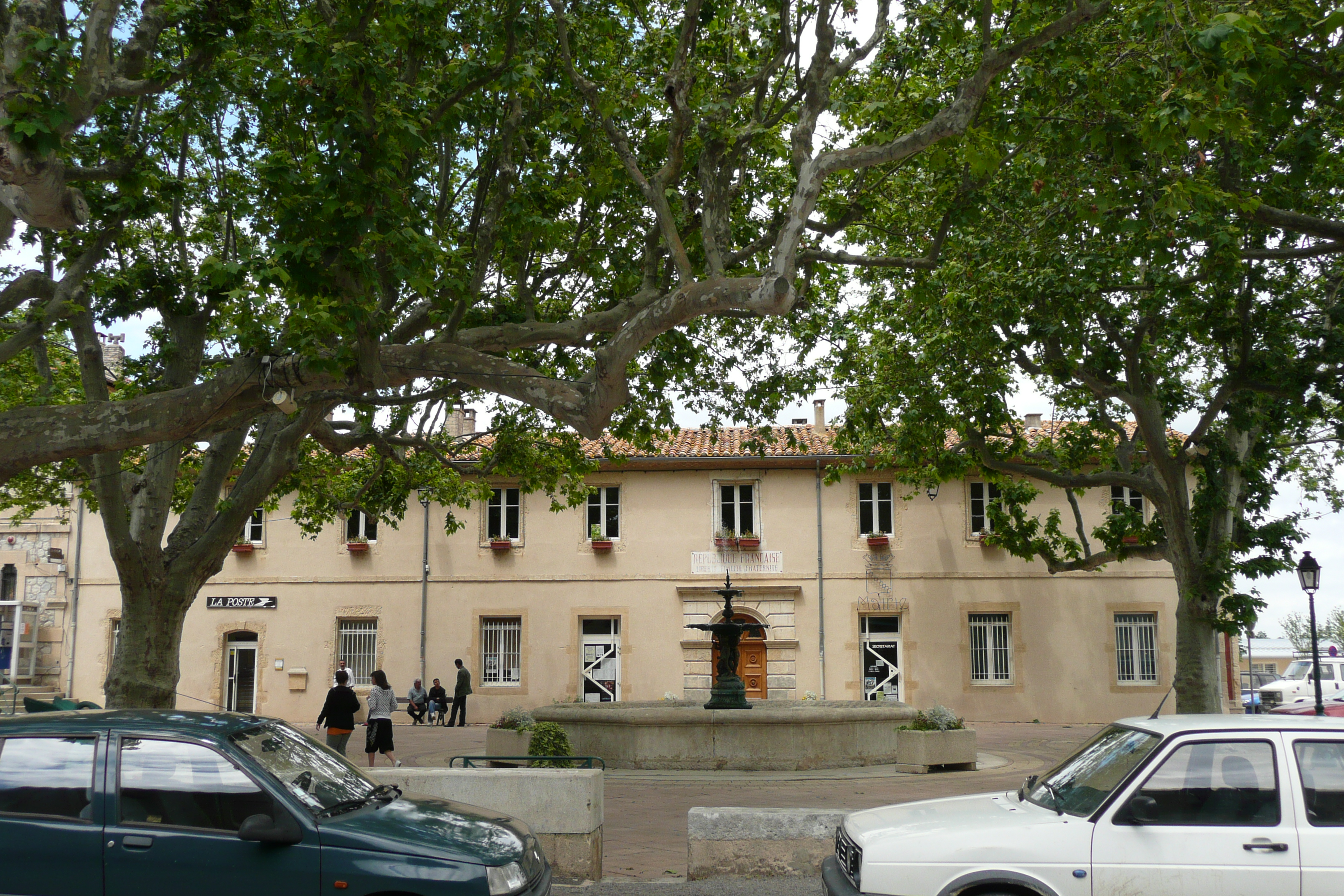 Mairie à Meynes.